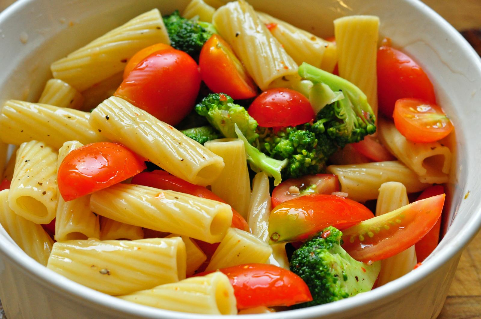 Mmm... pretty summer salad